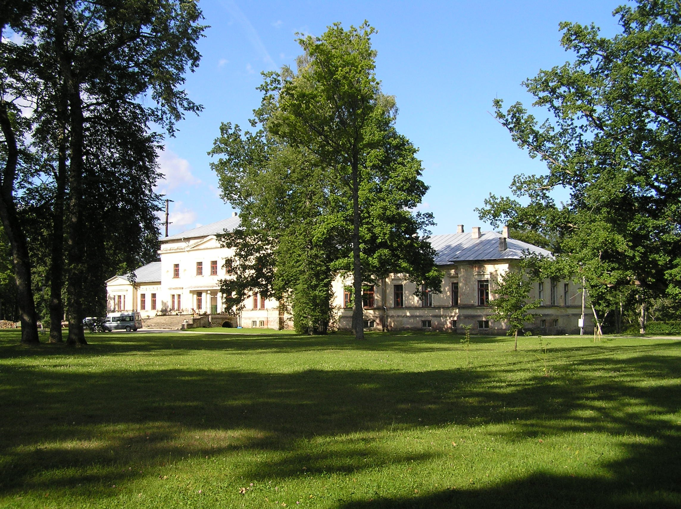 Käru mõisa peahoone